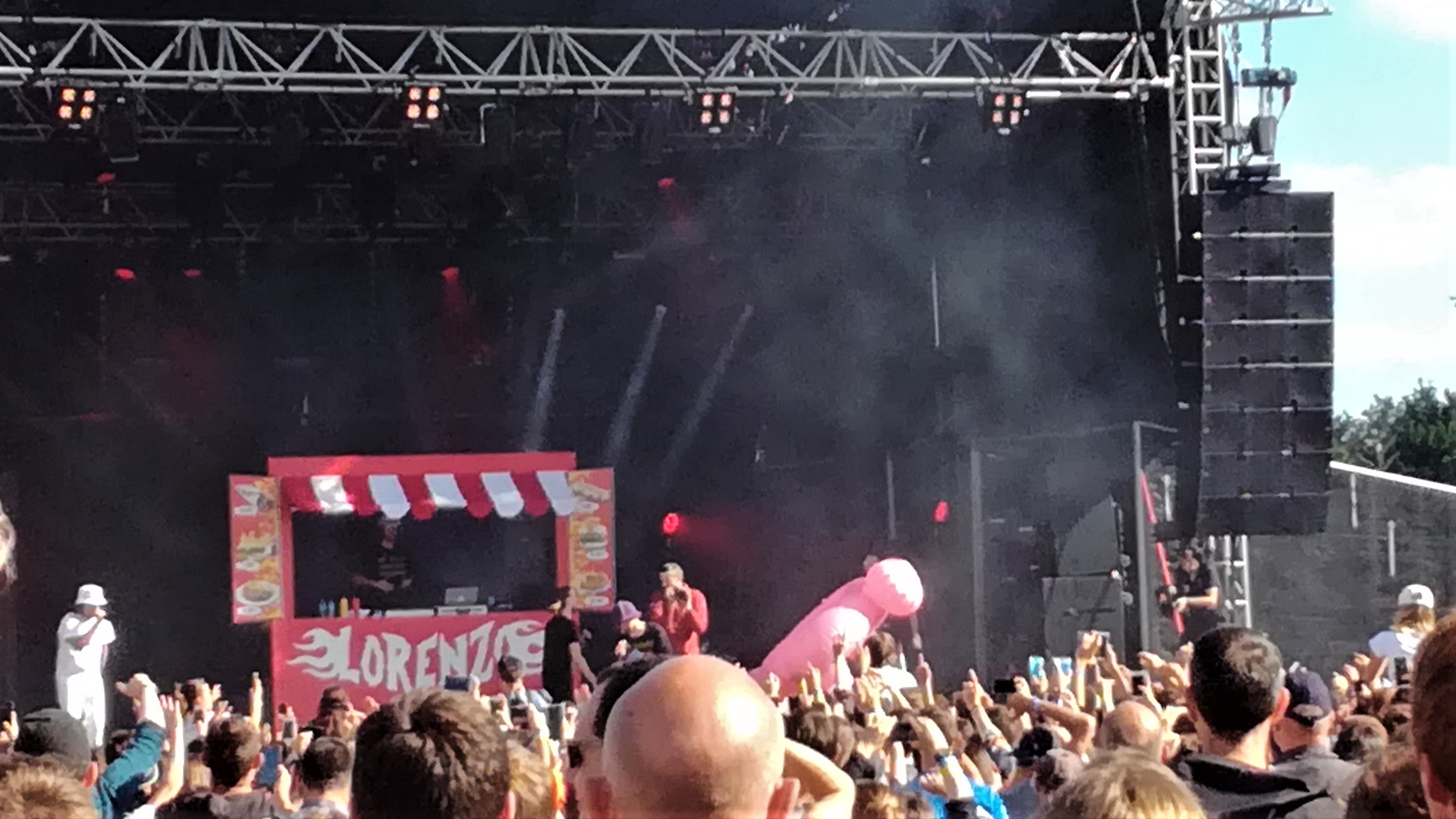 Lorenzo en concert au Festival de Bobital le 1er juillet 2017.